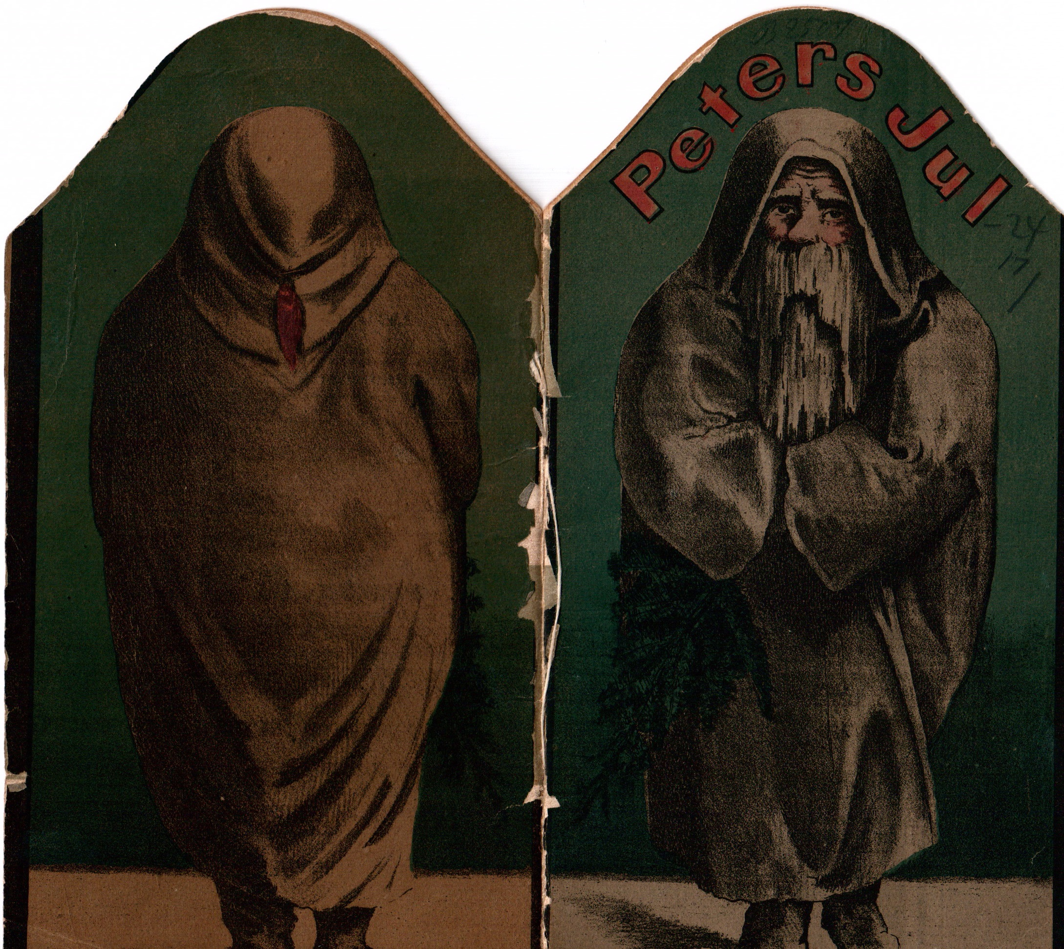 For- og bagside af førsteudgaven af Peters Jul fra 1866